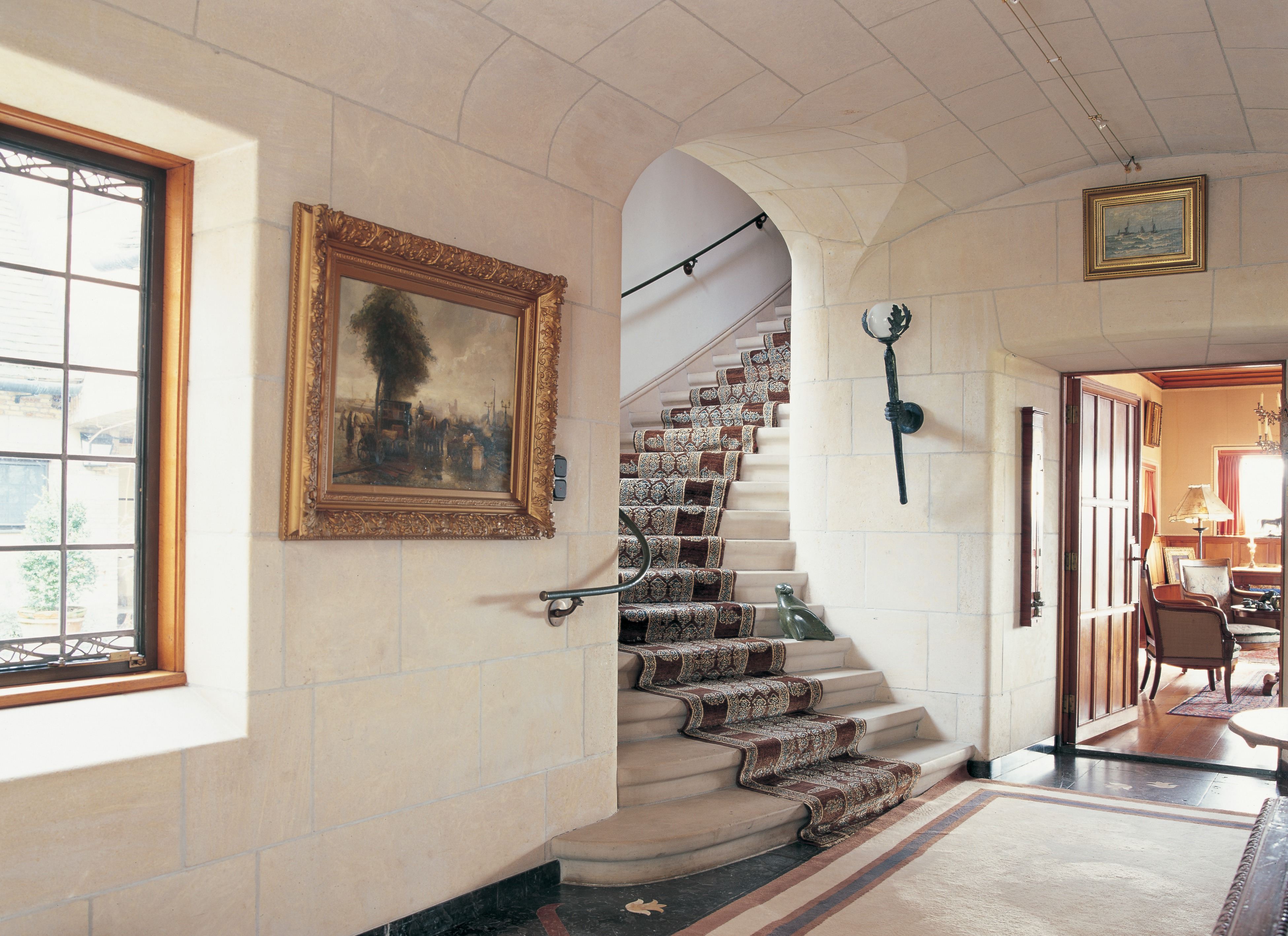 Licht gewelfde hal met natuurstenen vloer met inlegwerk en een stenen trap.